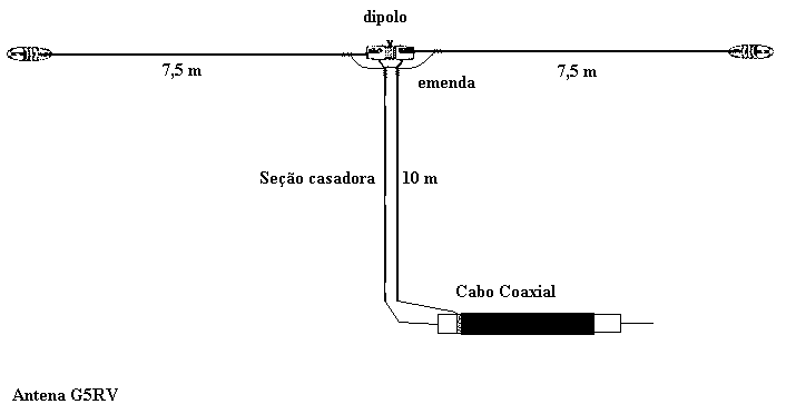 Antena G5RV de PY5AAL, esta antena quando inicialmente montada, aparentemente não demonstrou muita superioridade sobre o dipolo, apenas aparentemente. À medida em que foi sendo utilizada e na medida das reportagens de rendimento, se mostrou uma antena excelente, principalmente pelo fato de ser uma antena multibanda de fácil construção, está descrito seu rendimento em